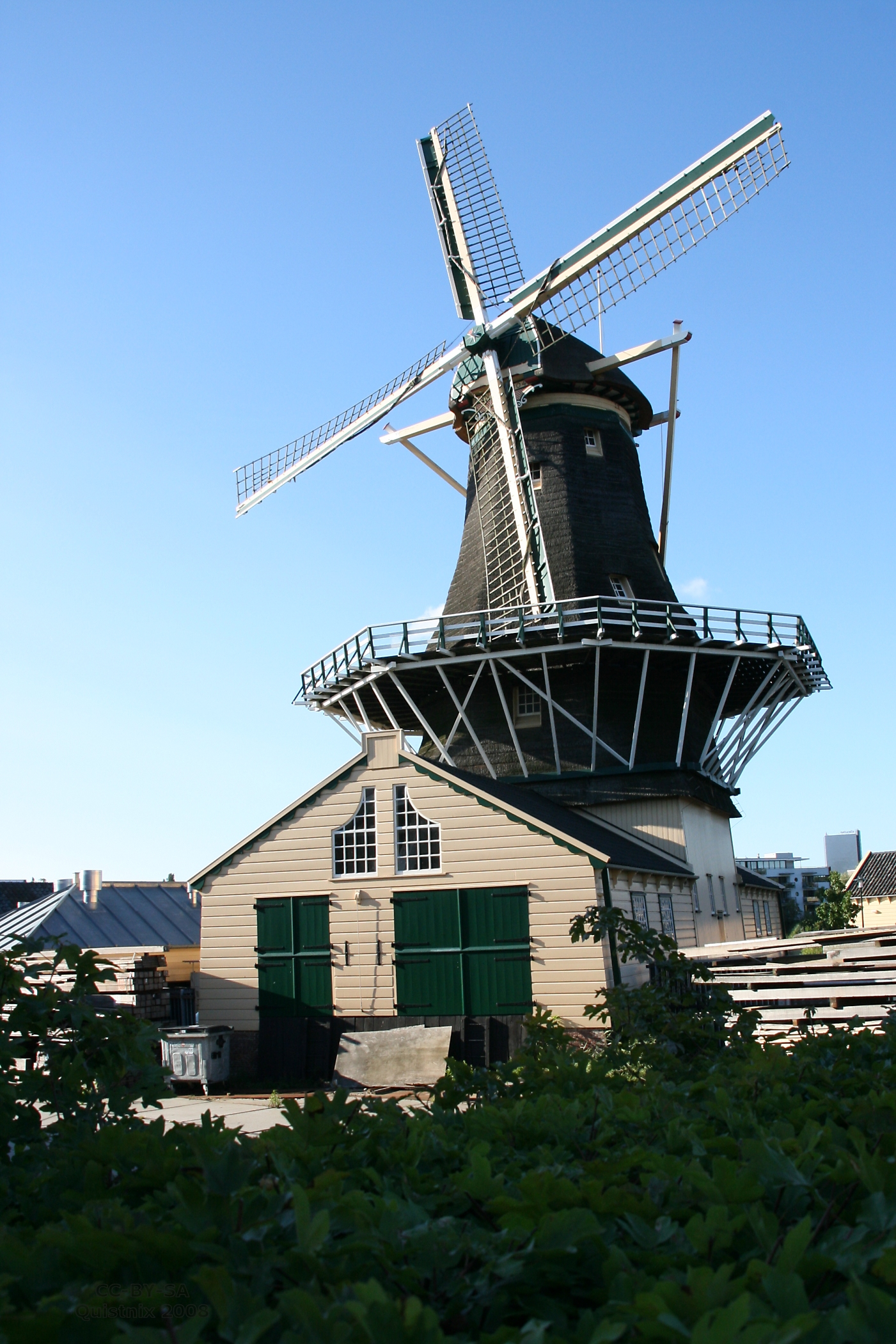 Leiden: molen d'Heesterboom (geofotografeerd vanaf het fietspad, boven de heg)